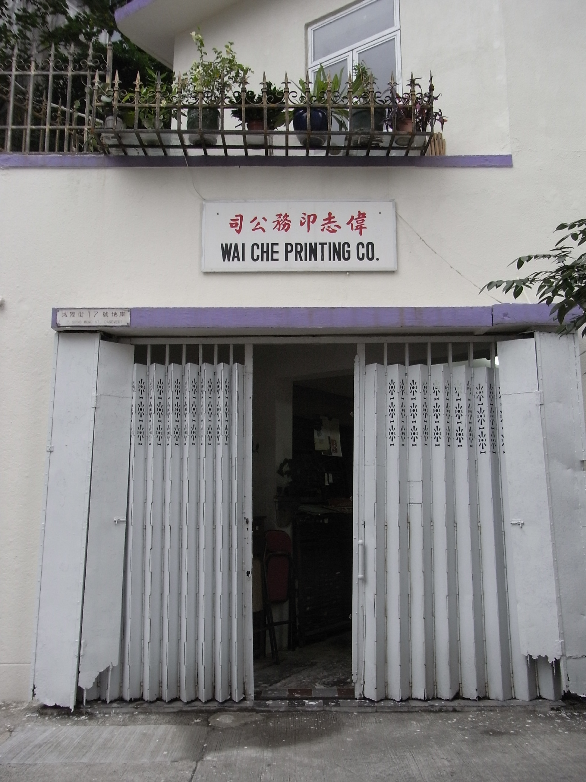 香港上環永利街，偉志印務公司